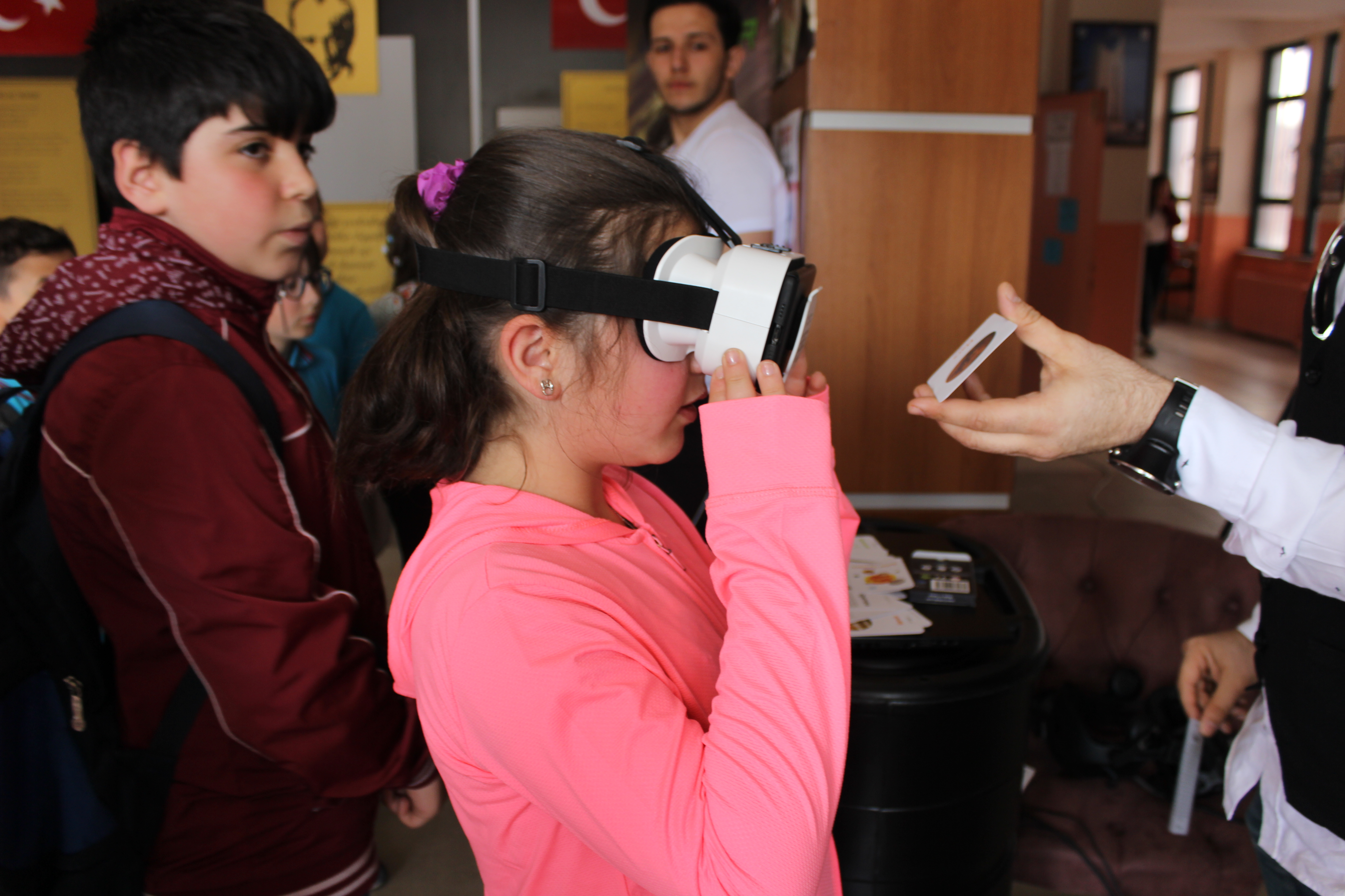 TeknoDolu 19' - TeknoPanayır'dan